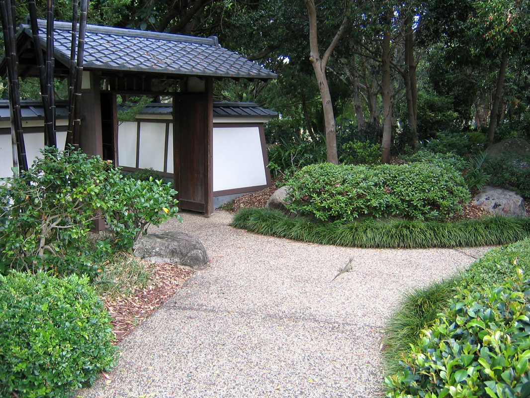 Japanese Garden